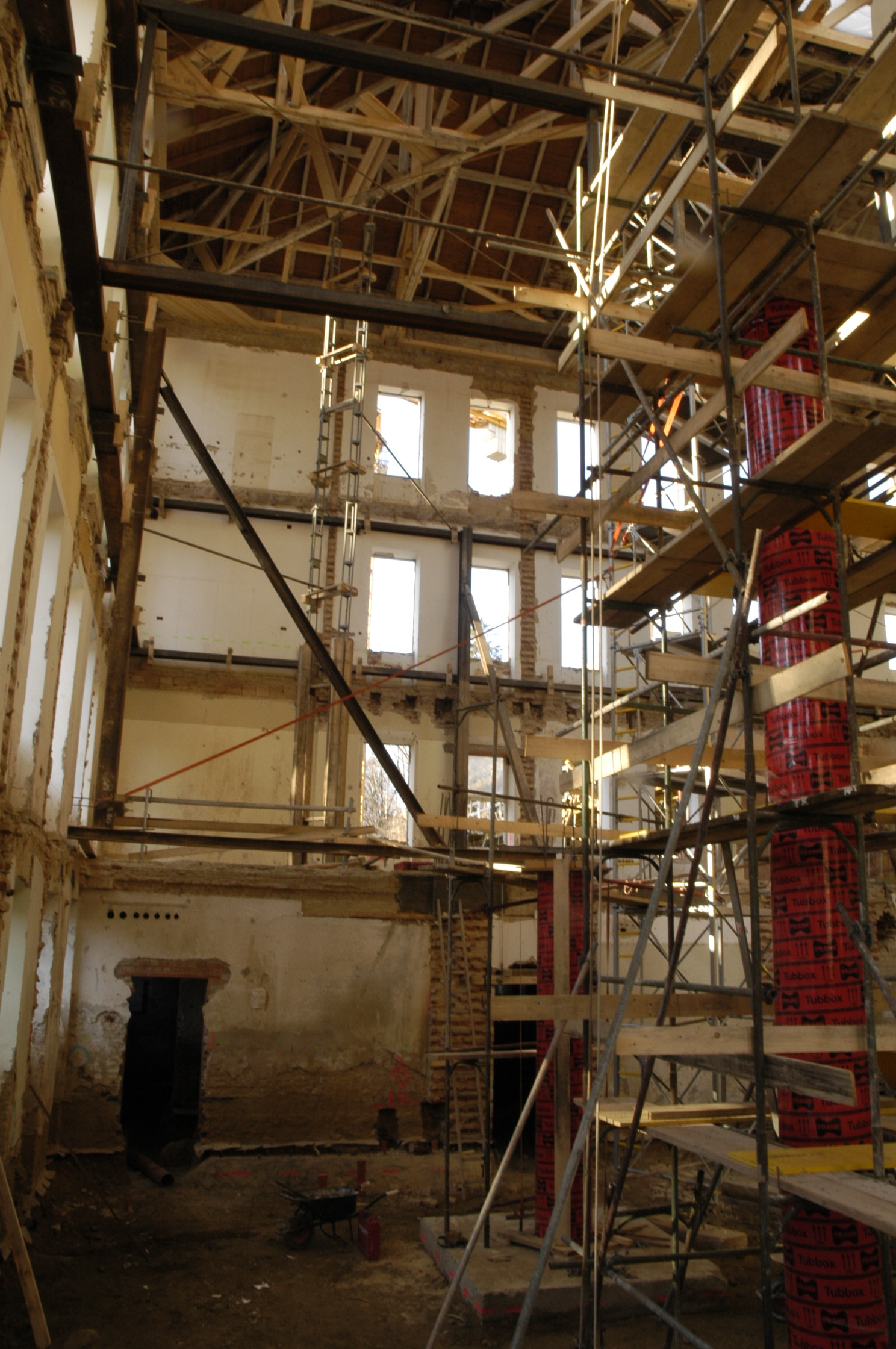 Umbau des Hauptgebäudes der Eliteuniversität; welches ursprünglich Ende des 19. Jhts als "Irrenanstalt" in Gugging gebaut wurde und später als Landesnervenheilanstalt geführt wurde.